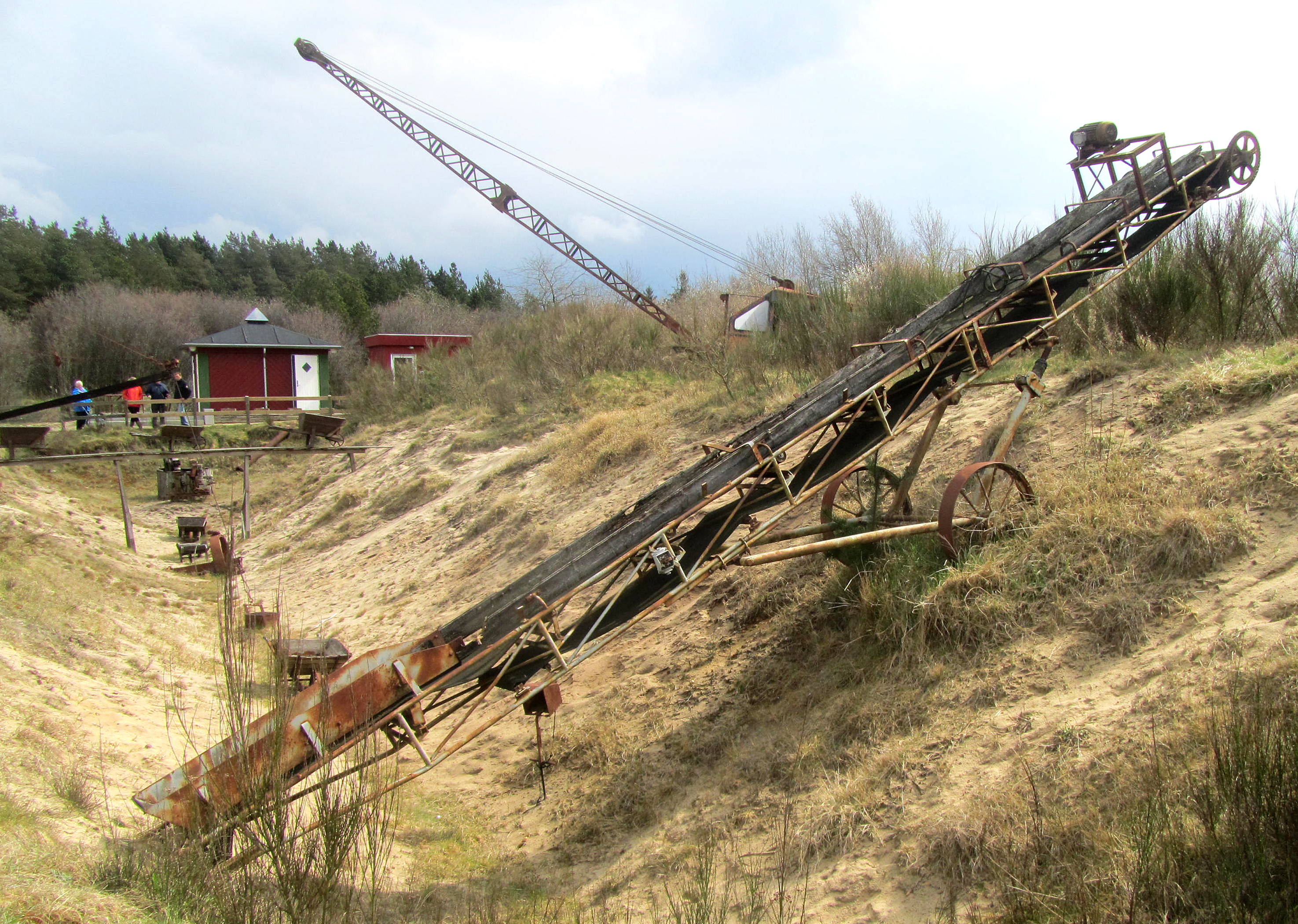 Transportør og gravemaskine ved Brunkulsmuseet ved Søby Brunkulslejer